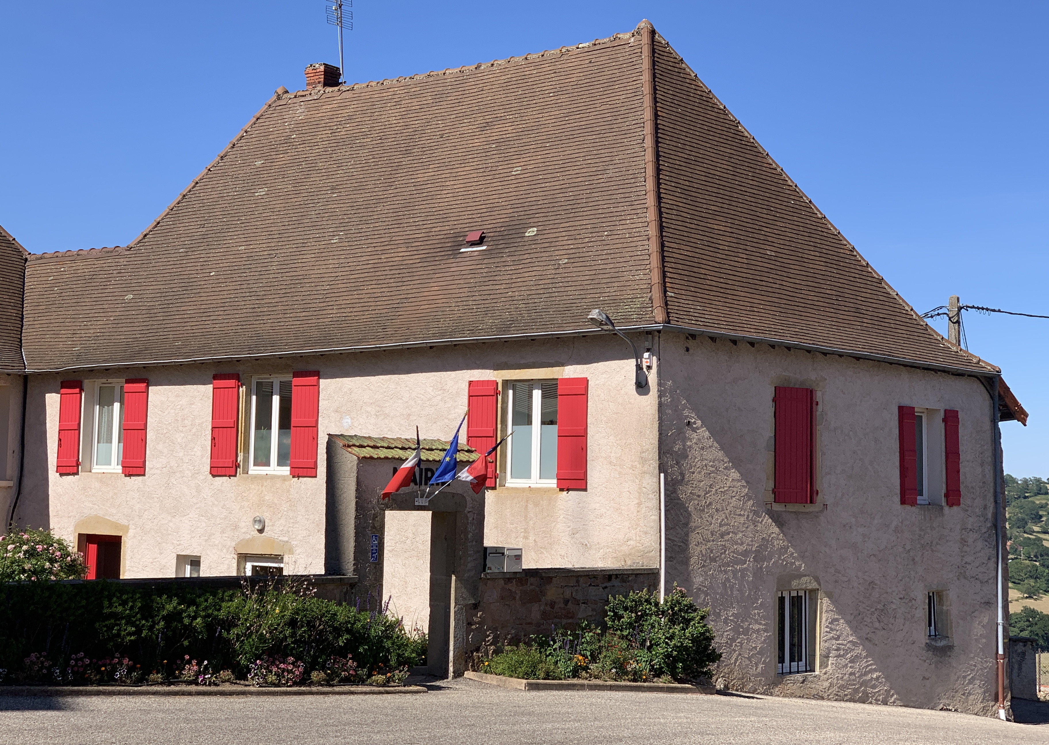 Mairie de Montmelard.